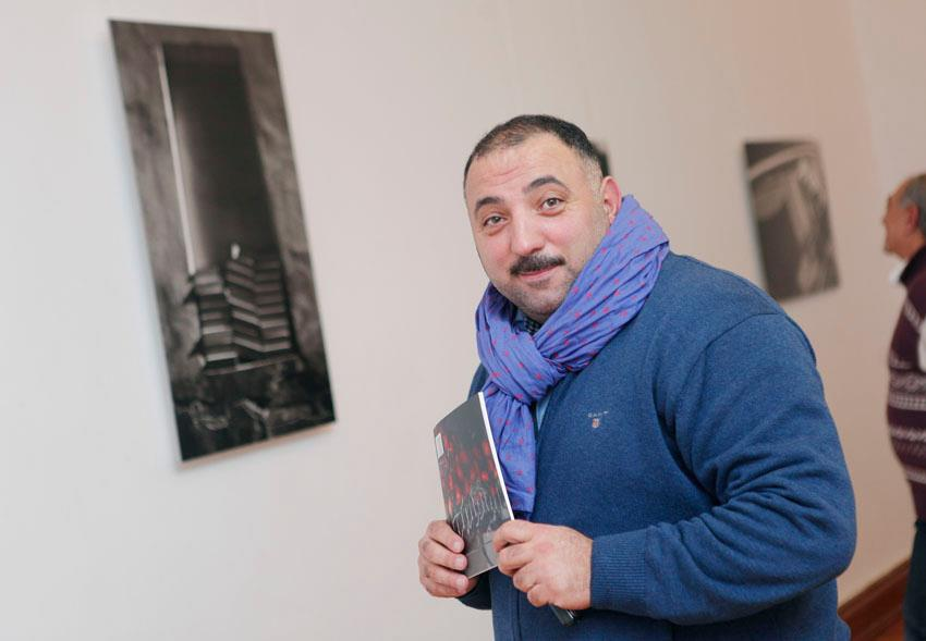 Bəhram Bağırzadə